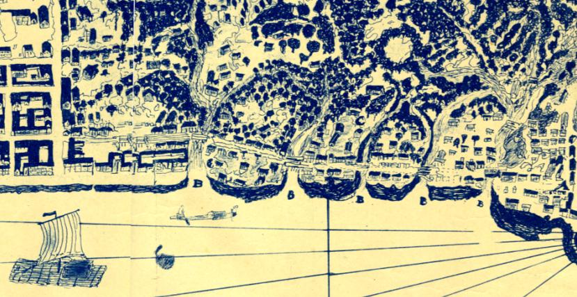 Ampliación detallada del puente en el plano de 1772 de Guayaquil por Ramón García de León y Pizarro.